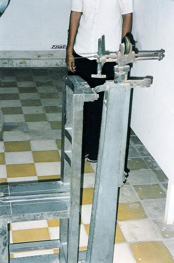 כסא שעליו ישבו האסירים בזמן שצולמו. המתקן שלח פולס חשמלי לראשם כדי לשתק אותם ולמנוע תזוזה בזמן הצילום. זכויות היוצרים על התמונה שייכות לי.